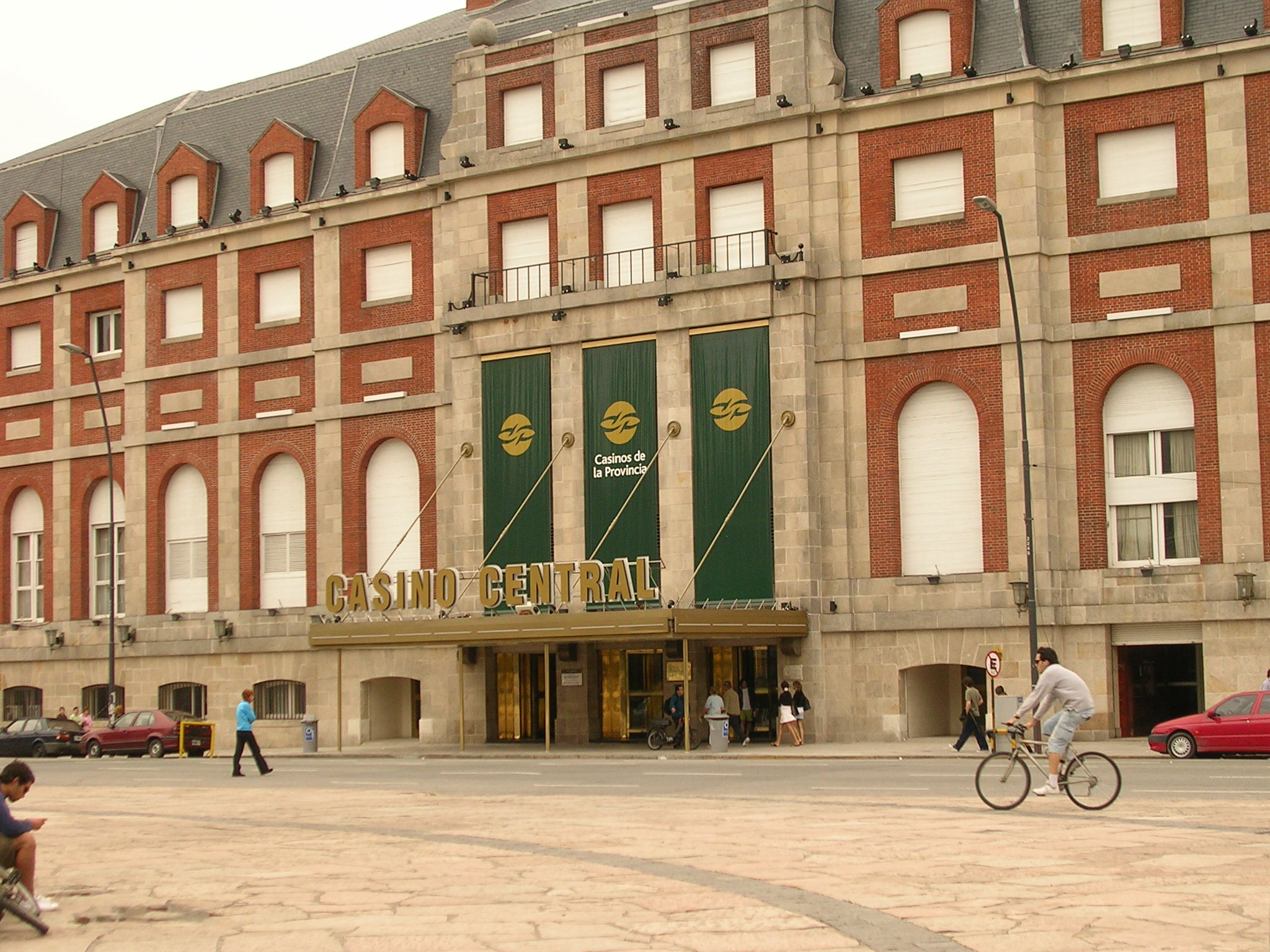 Casino de Mar del Plata, Argentina